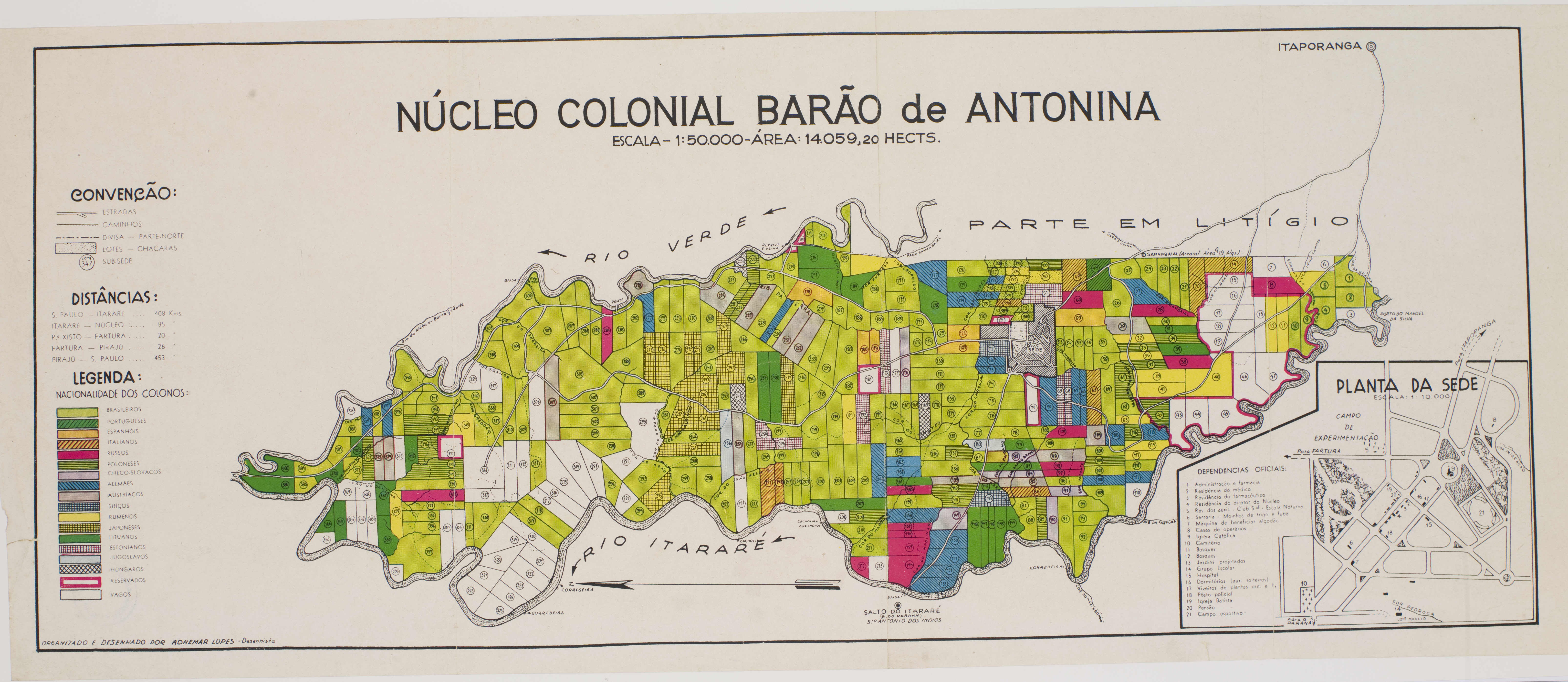 Obra que integra o acervo do Museu Paulista da USP. Coleção João Baptista de Campos Aguirra